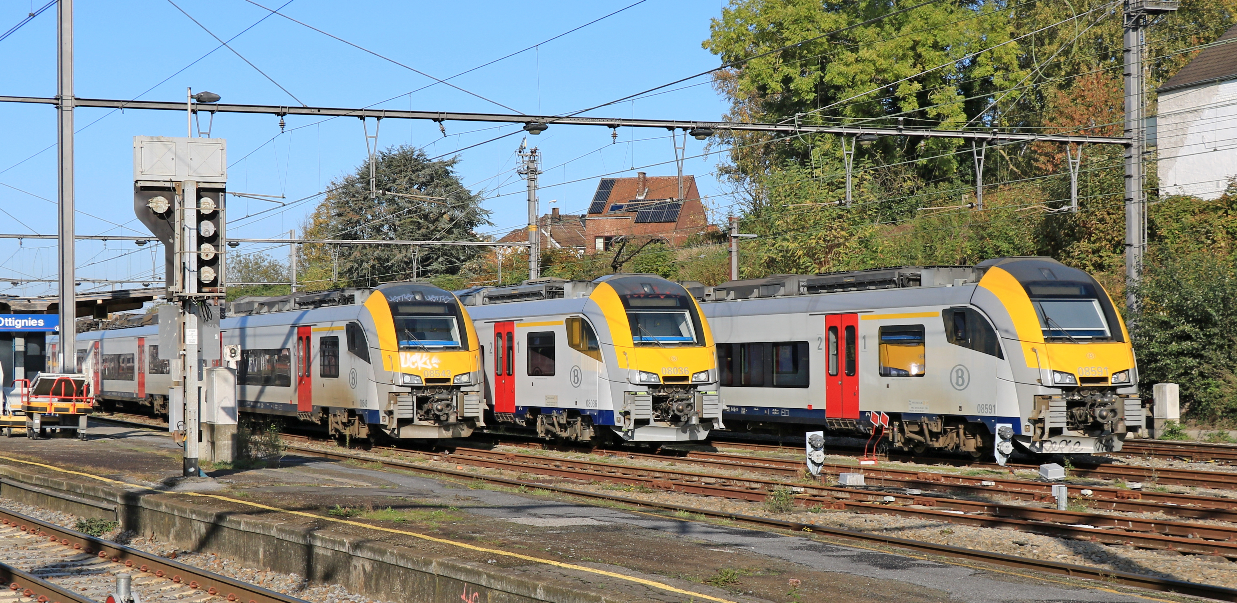 Belgique - Gare d'Ottignies - rames automotrices Desiro ML